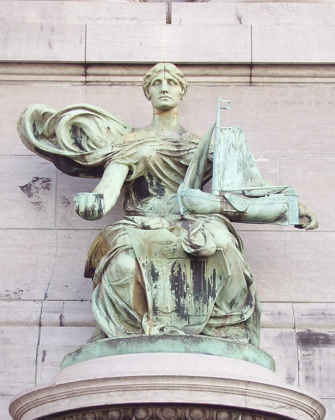 Arcades du Cinquantenaire, Bruxelles - Province d'Anvers par Charles Van der Stappen